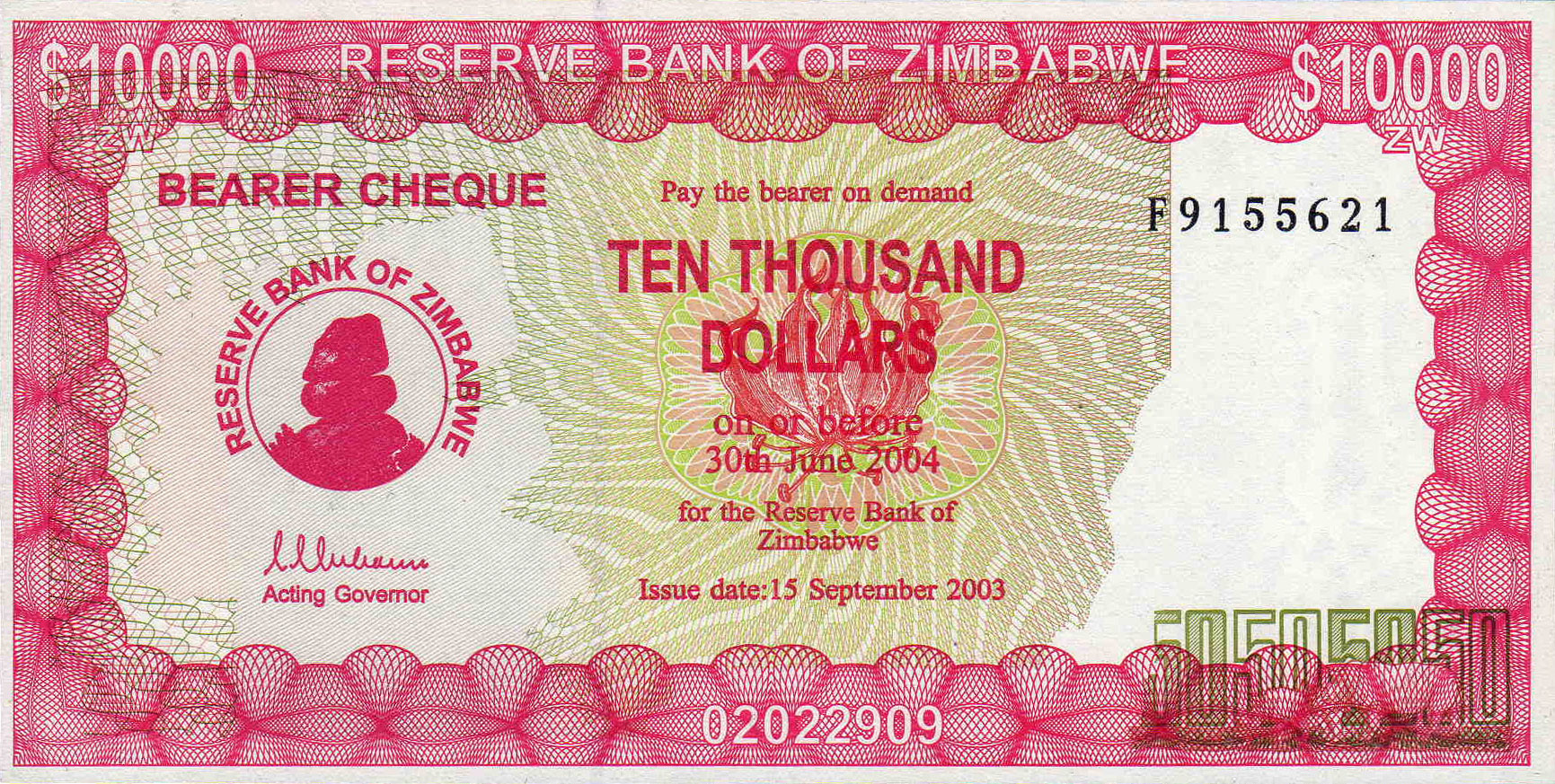 ジンバブエ準備銀行が発行した10000ジンバブエ・ドルの銀行小切手（インフレーションのため、臨時に紙幣として流通）